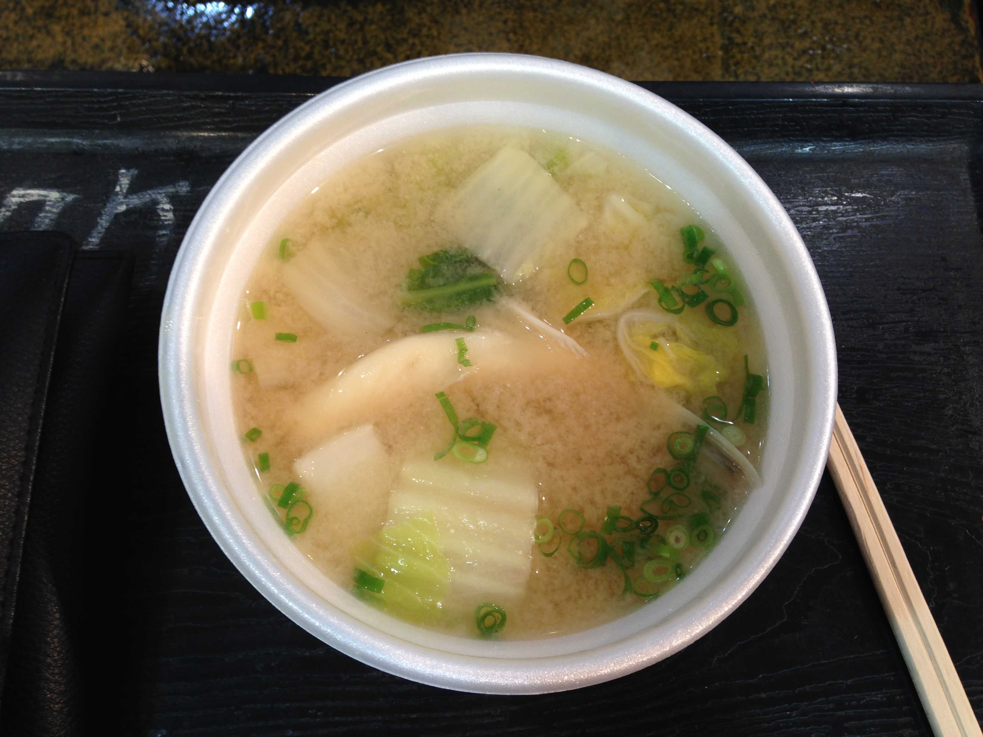 唐戸市場のふく汁